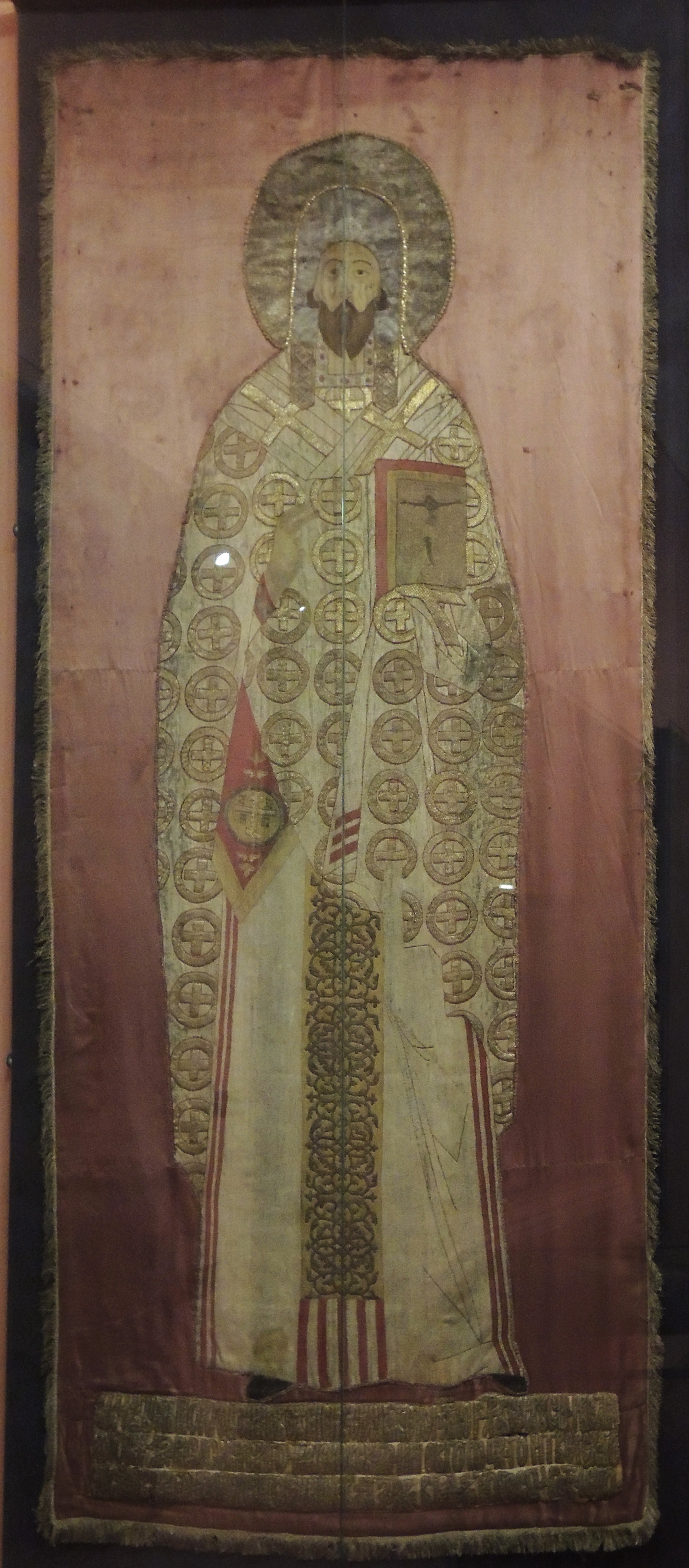 Покров святителя Леонтия Ростовского. 1514. Мастерская вел. кн. Соломонии Сабуровой. Вклад вел. кн. Василия III в Успенский собор в Ростове. Ростовский музей